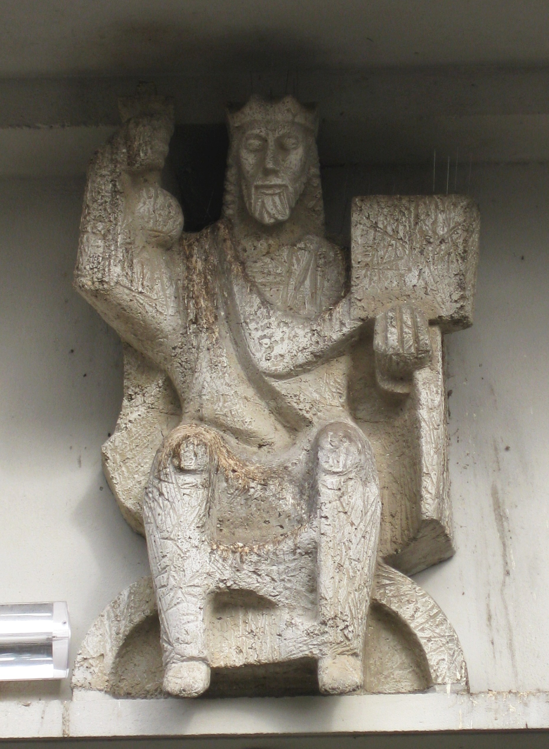 Gevelbeeld van Christus Koning, Christus Koningkerk, James Wattstraat 58, Amsterdam-Oost. 1958